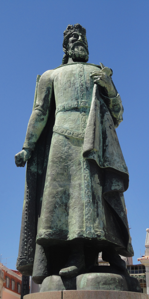 António Duarte, D. Pedro I, c. 1964, bronze